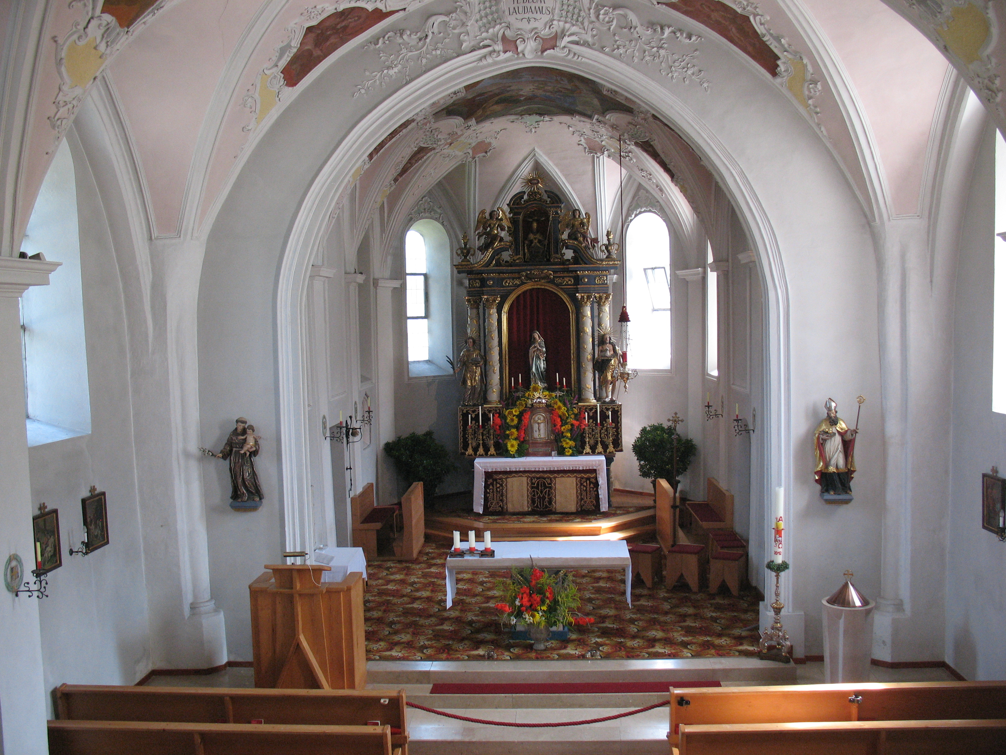 Kath. Pfarrkirche hl. Sixtus mit Kriegerdenkmal